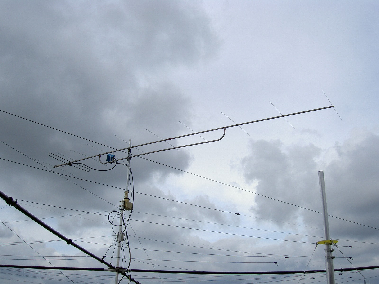 Motiv: Lang-Yagi-Uda-Antenne für das 2m Band